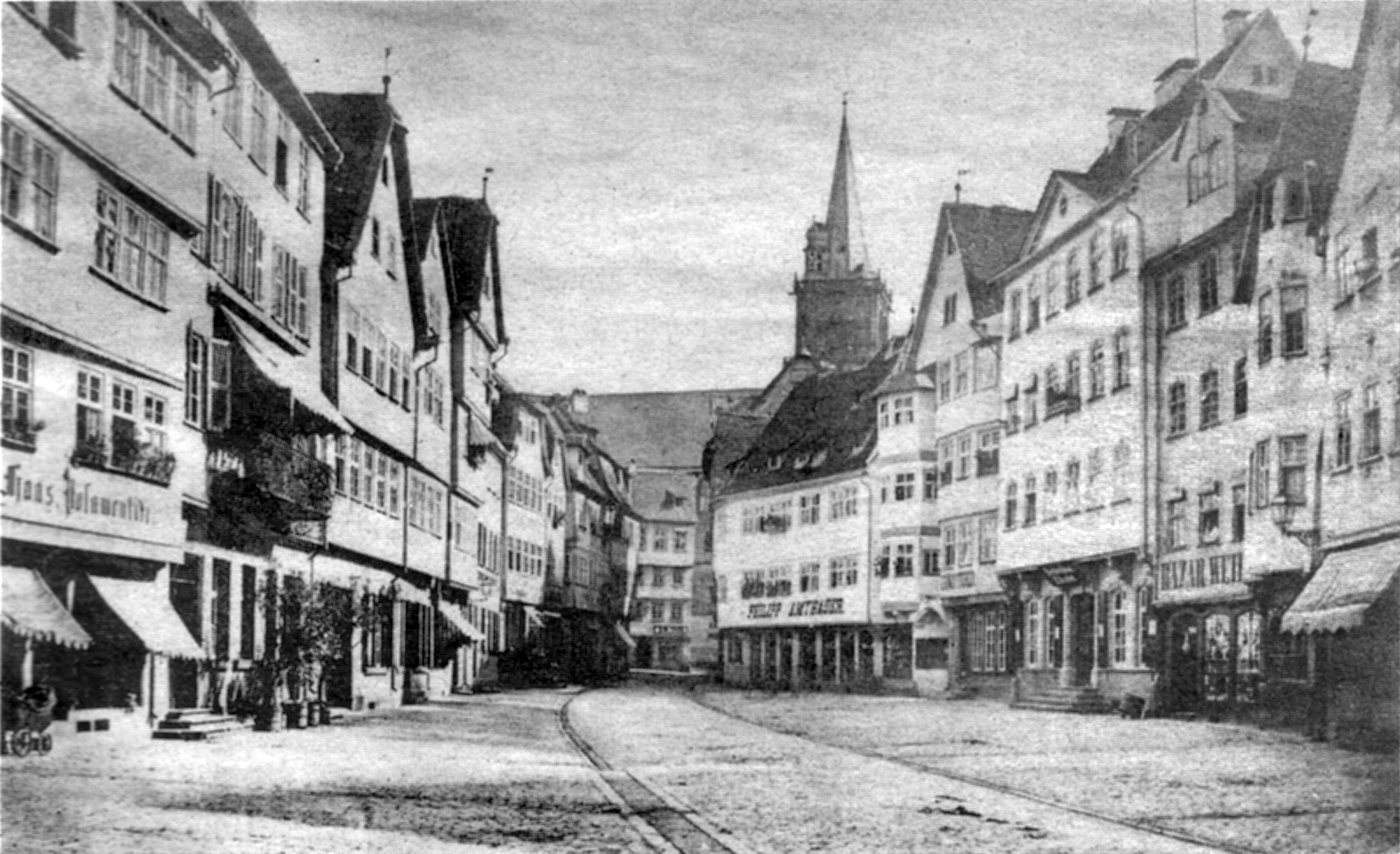 Blick auf den Wertheimer Marktplatz, Aufnahmedatum vor 1882 (Visitformat)